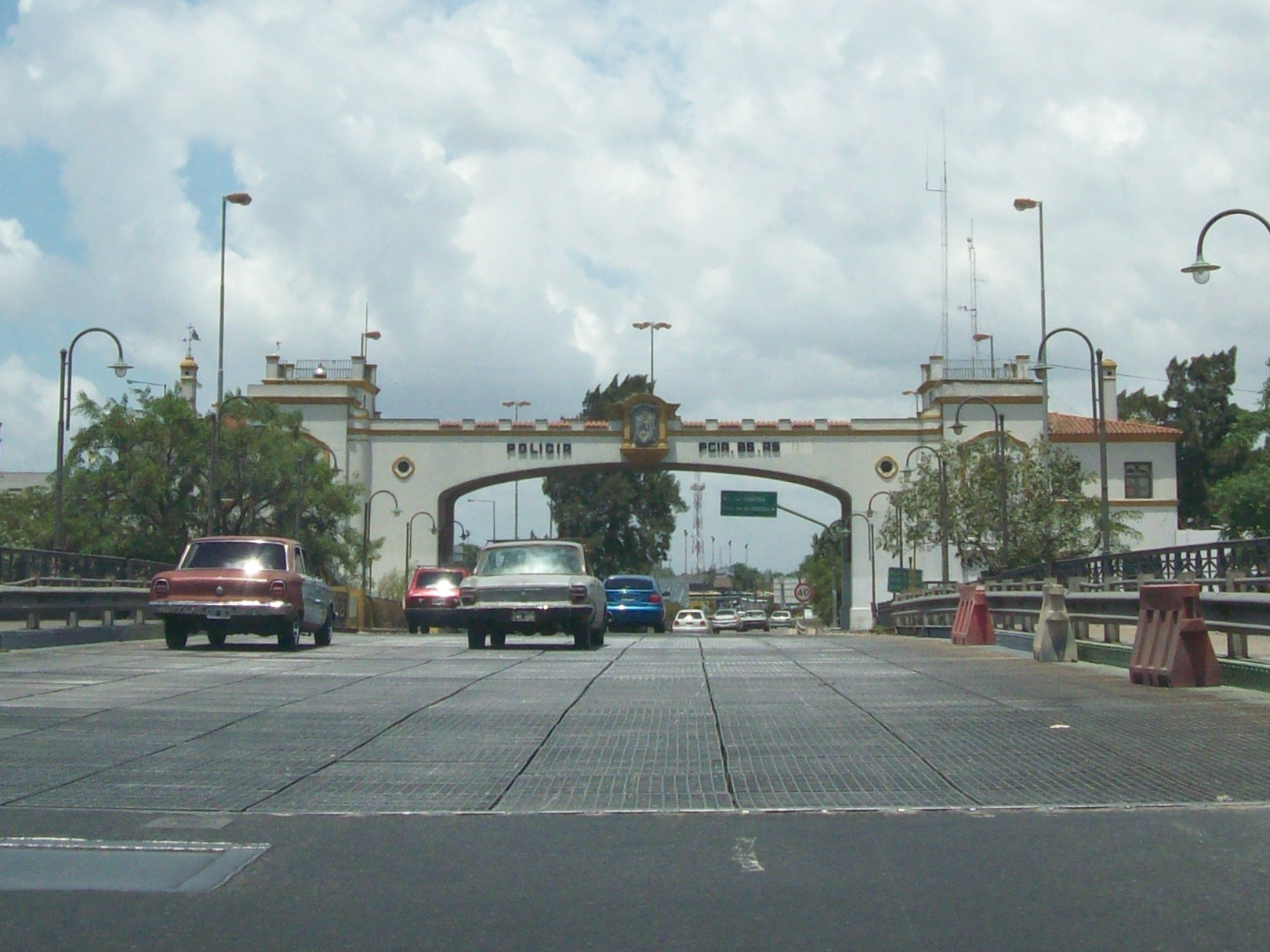 Puente de la Noria sobre el Riachuelo